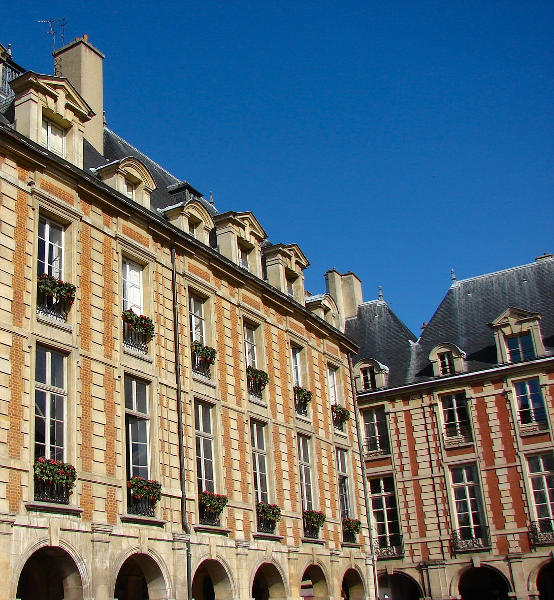 Hôtel Marchand - 19 Place des Vosges - Paris 4 Vue de la façade du pavillon (aussi appelé Hôtel de Montbrun) .